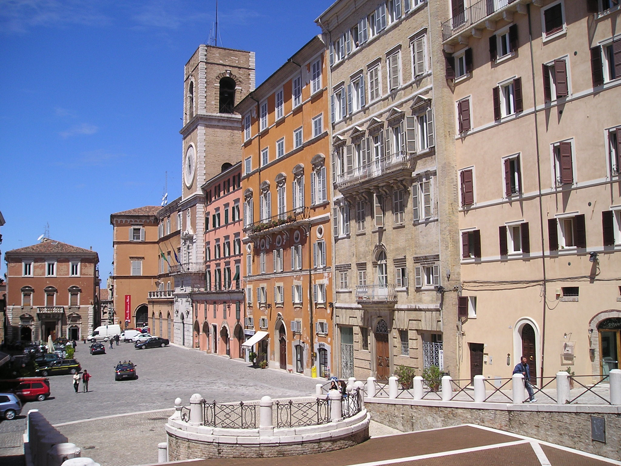 Foto di Ancona, scattata da Massimo Macconi (maggio 2005)